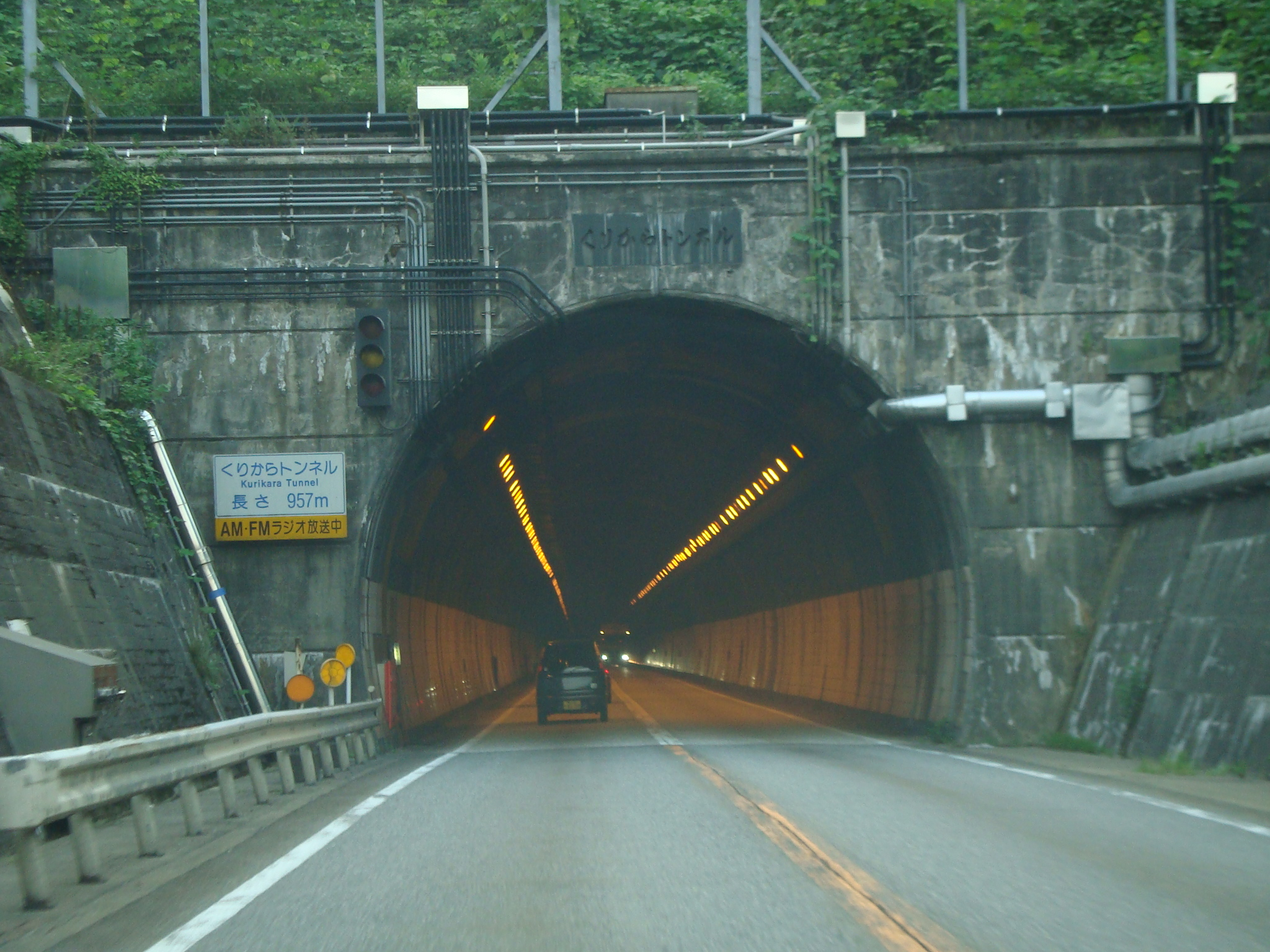 国道8号 くりからバイパス 倶利伽羅トンネル 富山県側入り口